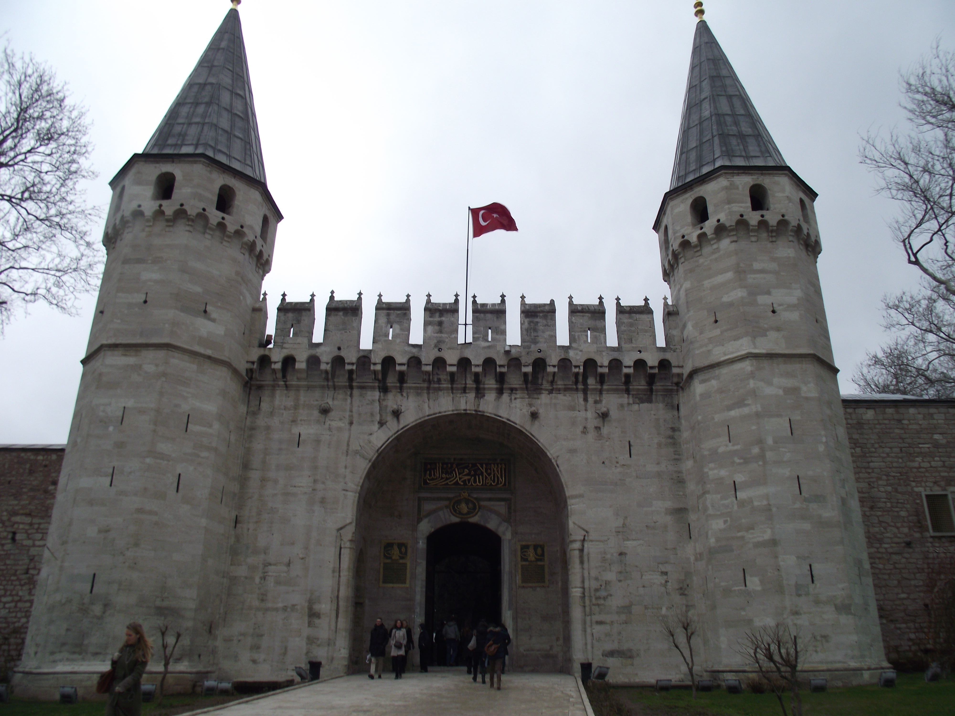 Topkapi Sarayi